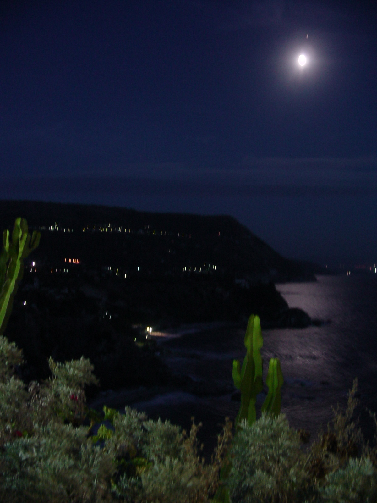 Strandsicht bei Mondbeleuhtung in Ricadi (Kalabrien).